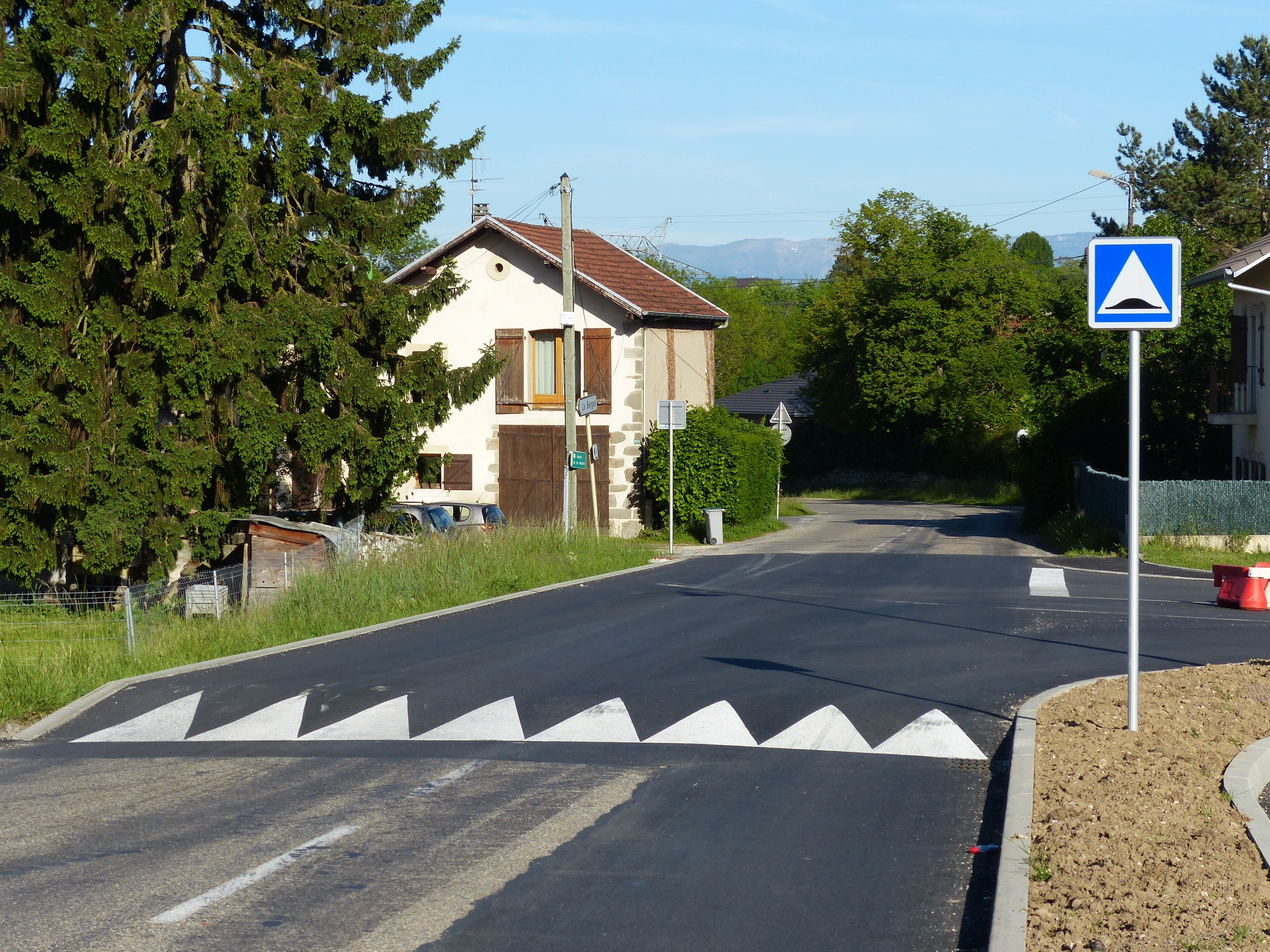 Panneau C27 posé au printemps 2017, D183, La Bergue, Cranves-Sales, Haute-Savoie, France.